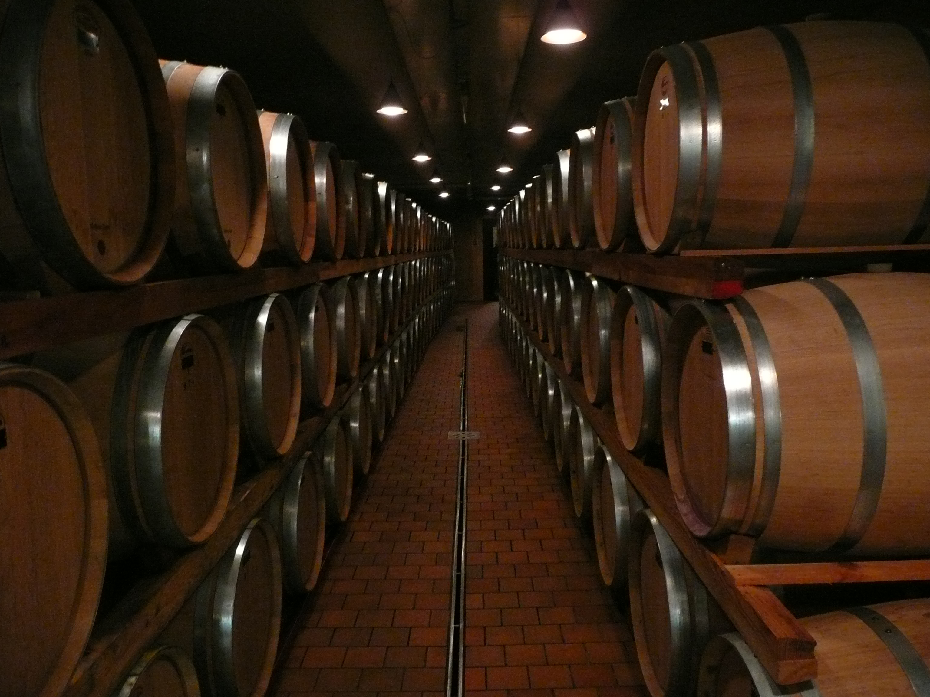 Cantine marchesi di barolo, barolo, italy